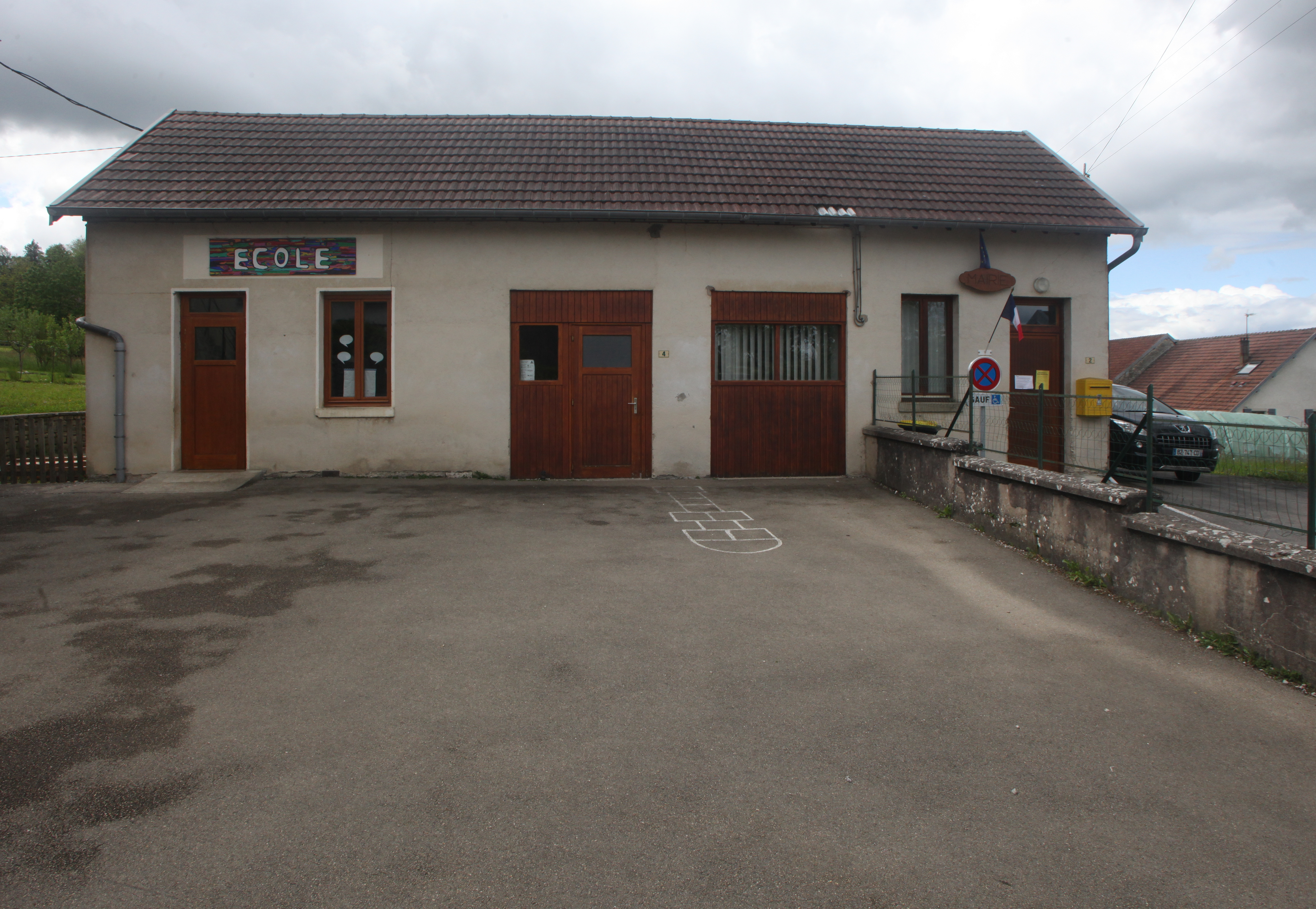 Mairie-école de Paroy.